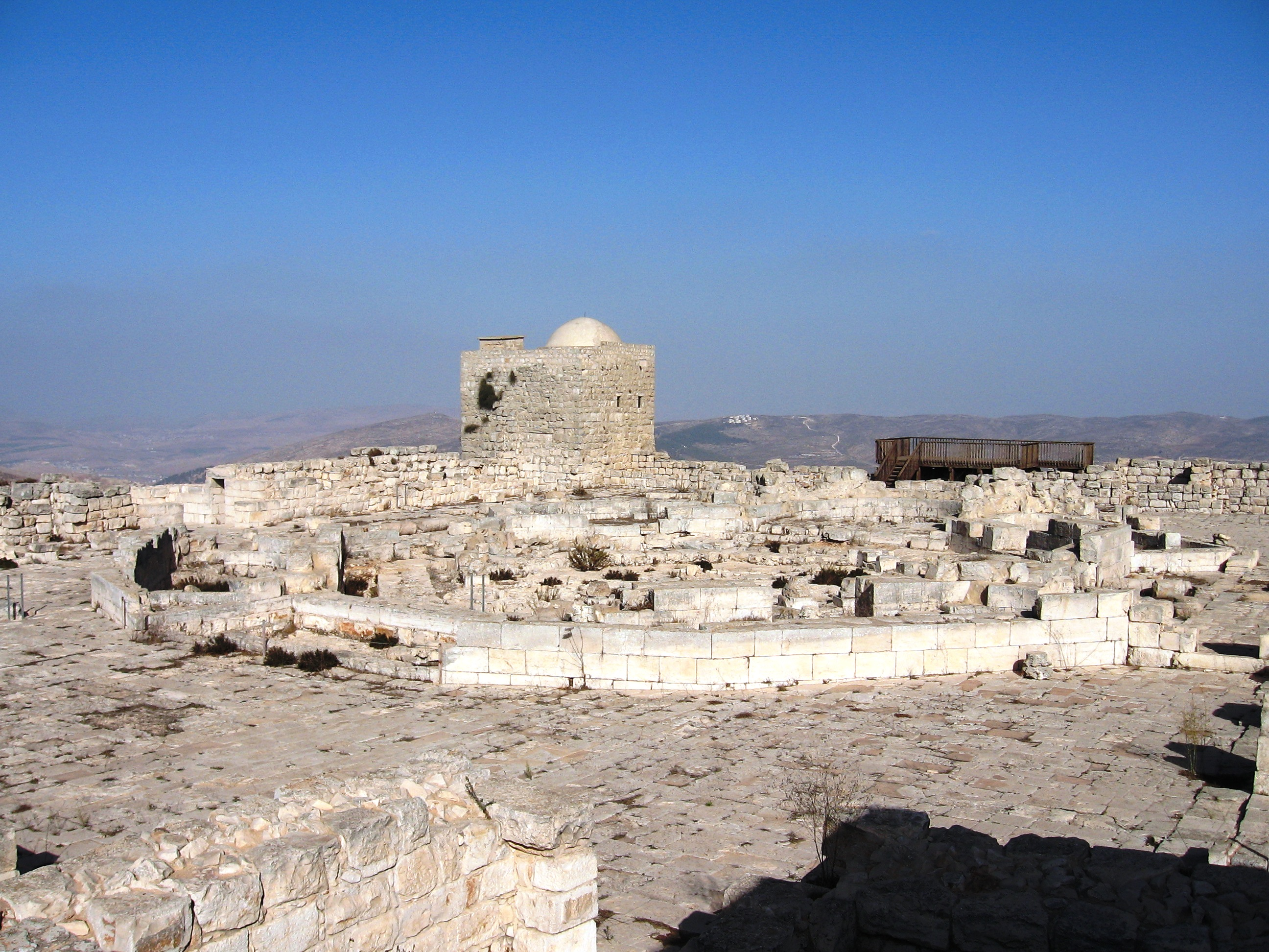 תרבות השומרונים בהר זריזים